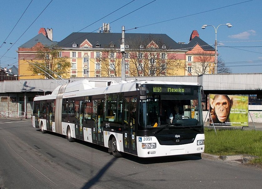 SOR TNB 18 Náměstí republiky